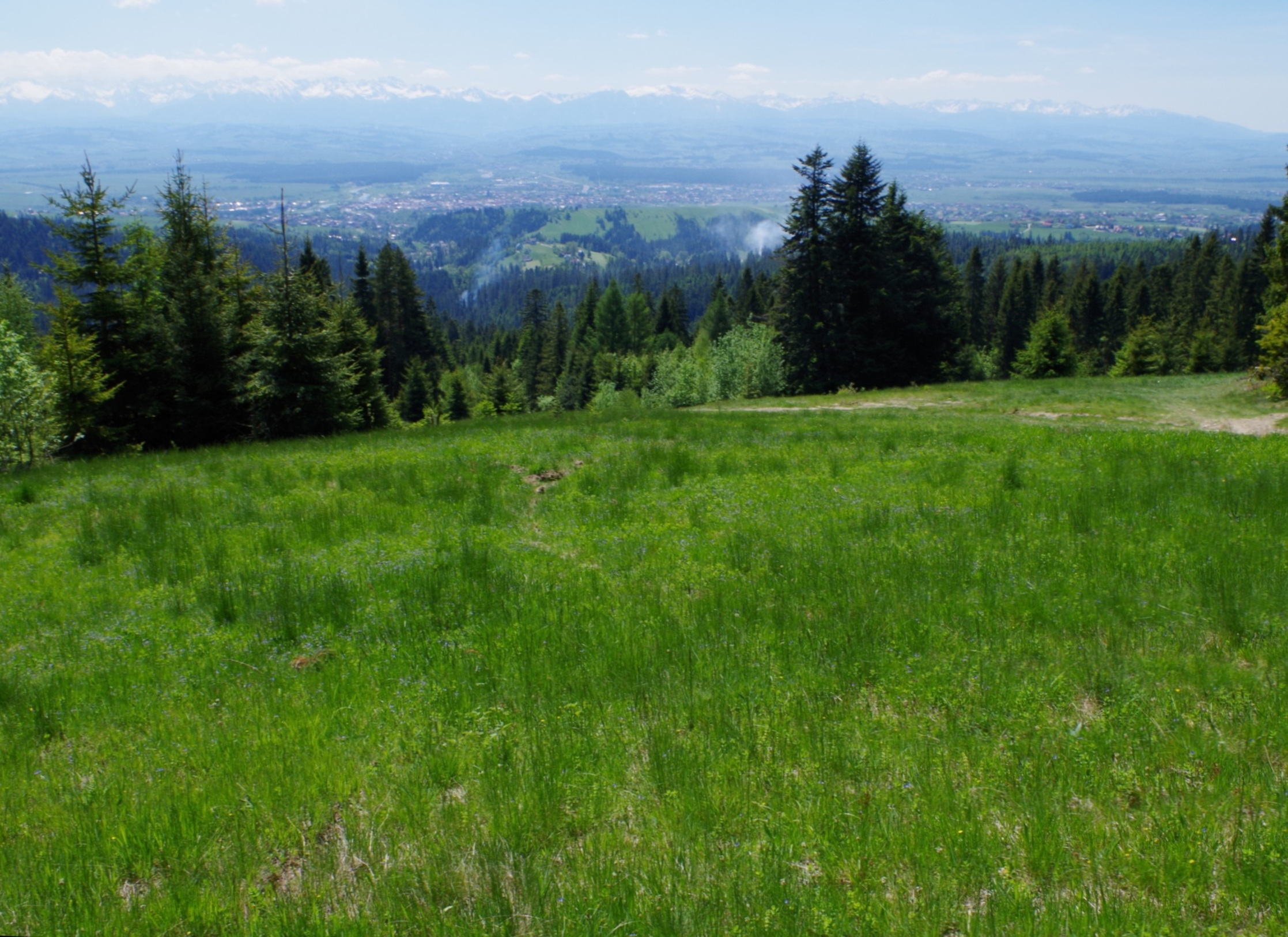 Polana Kotlarka